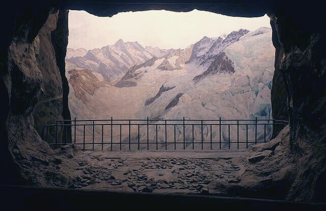 Panoramabild "Eismeer" Alpineum Luzern